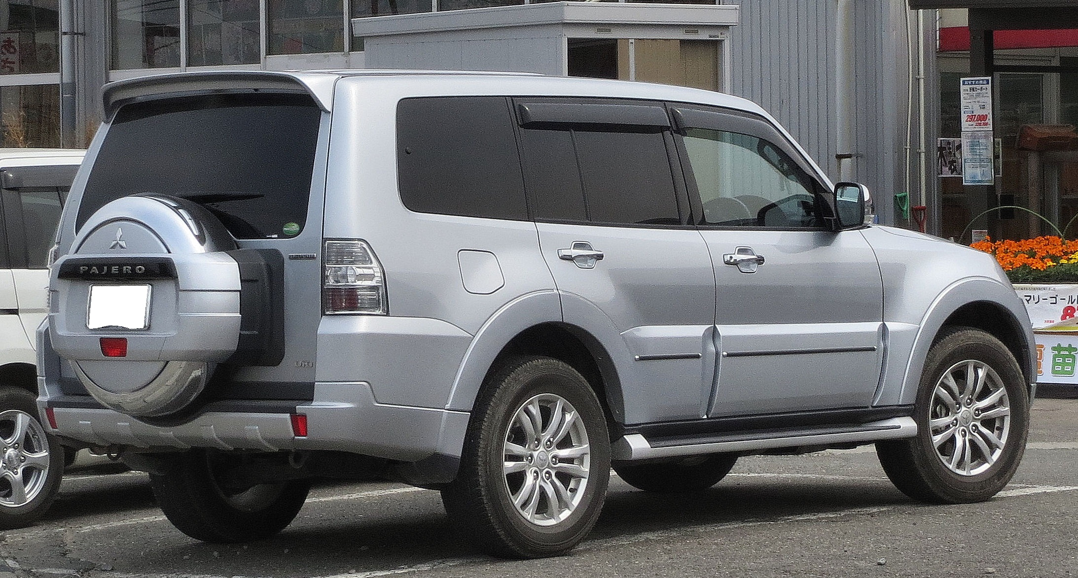 三菱 パジェロ ロングボディ Super Exceed 3200DID